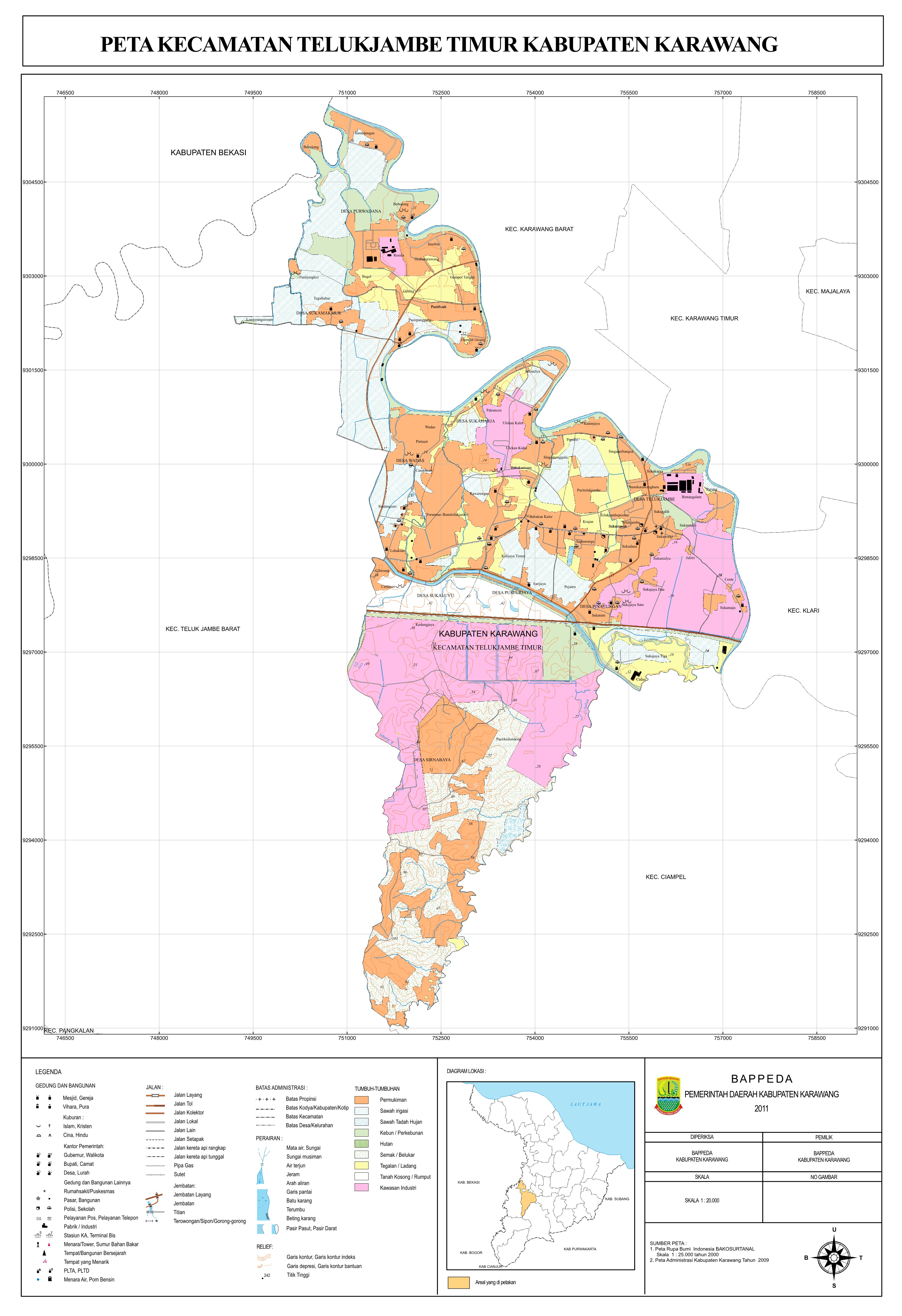 Peta Kecamatan Telukjambe Timur, 2011 BAPPEDA Kabupaten Karawang